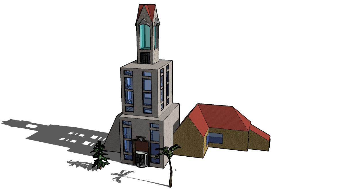 Google Sketchup-Grafik